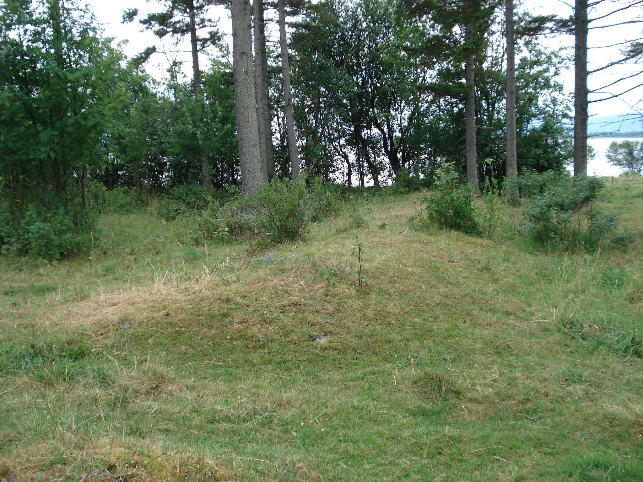 Nausttomt for vikingeskip, Rygg på Frosta